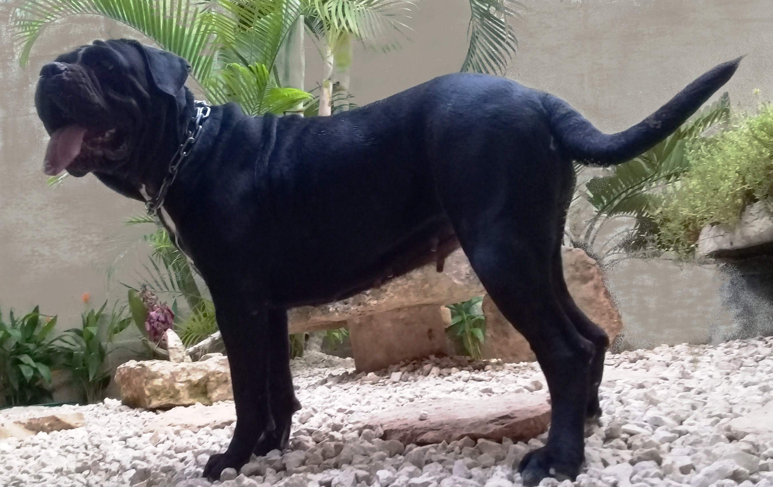 Cane da Presa Ejemplar 2018